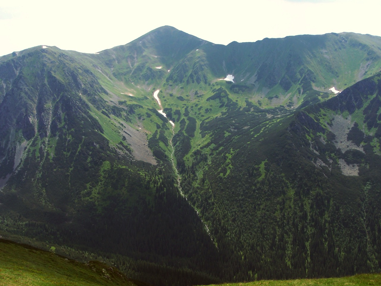 Wielkie Rycerowe(Tatra Mountains)